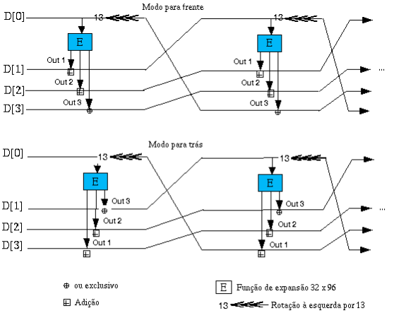 Rede Feistel tipo 3 de transforma¸c˜ao chaveada principal